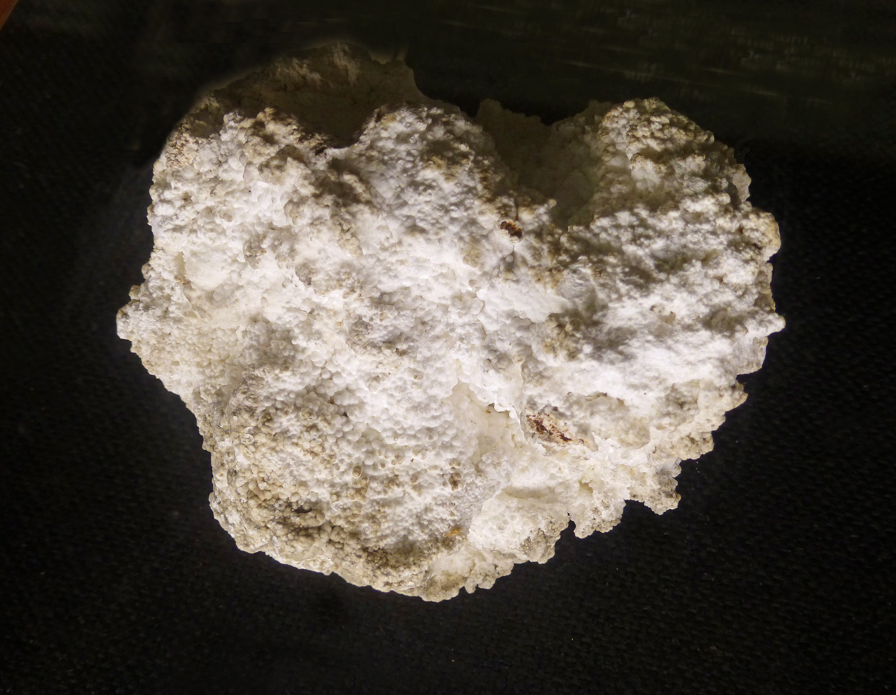 Hörnesite (Neuenberg, Sainte-Marie-aux-Mines, Haut-Rhin). Musée de minéralogie de Strasbourg